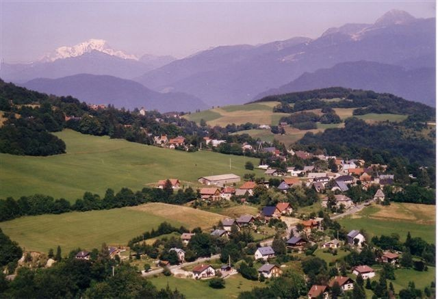 Photo der französischen Gemeinde Saint-Pancrasse en Chartreuse